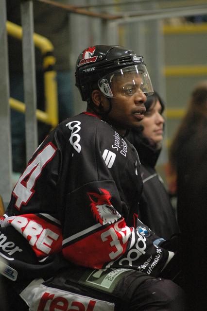 Jean-Luc Grand-Pierre im Trikot der Duisburger Füchse 2006